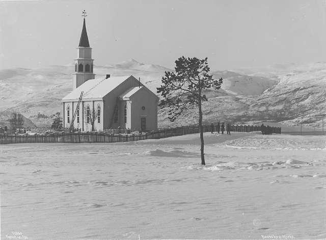 Alta kyrkje